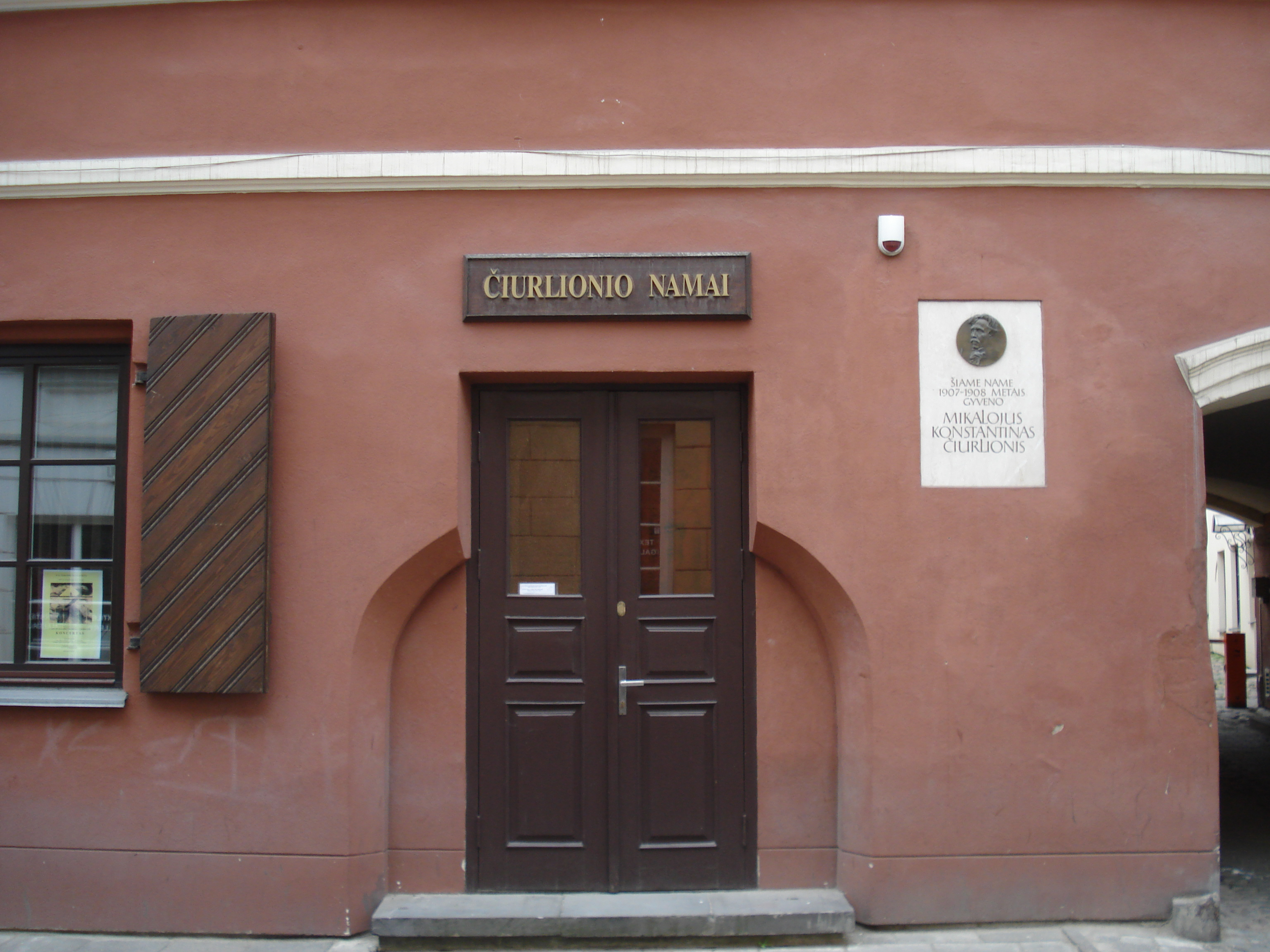 House of M. K. Čiurlionis in Vilnius. M. K. Čiurlionio namai, memorialinis kultūros centras (Savičiaus g. 11)